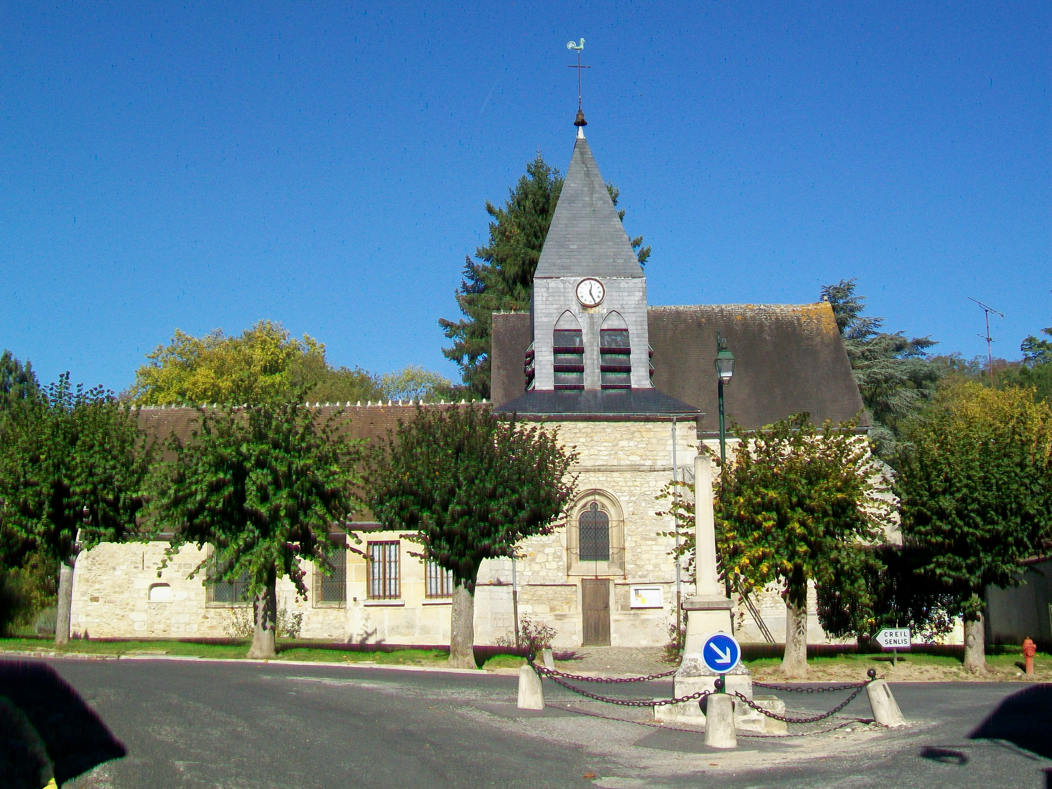 L'église Saint-Gervais-et-Protais, façade sud, et le calvaire sur la place devant la mairie.